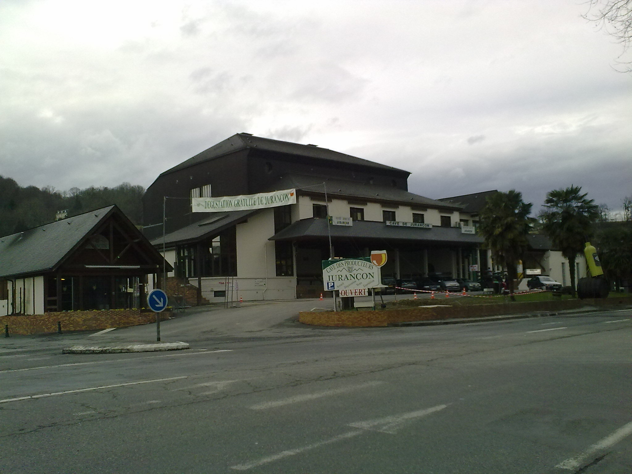 Cave de Gan